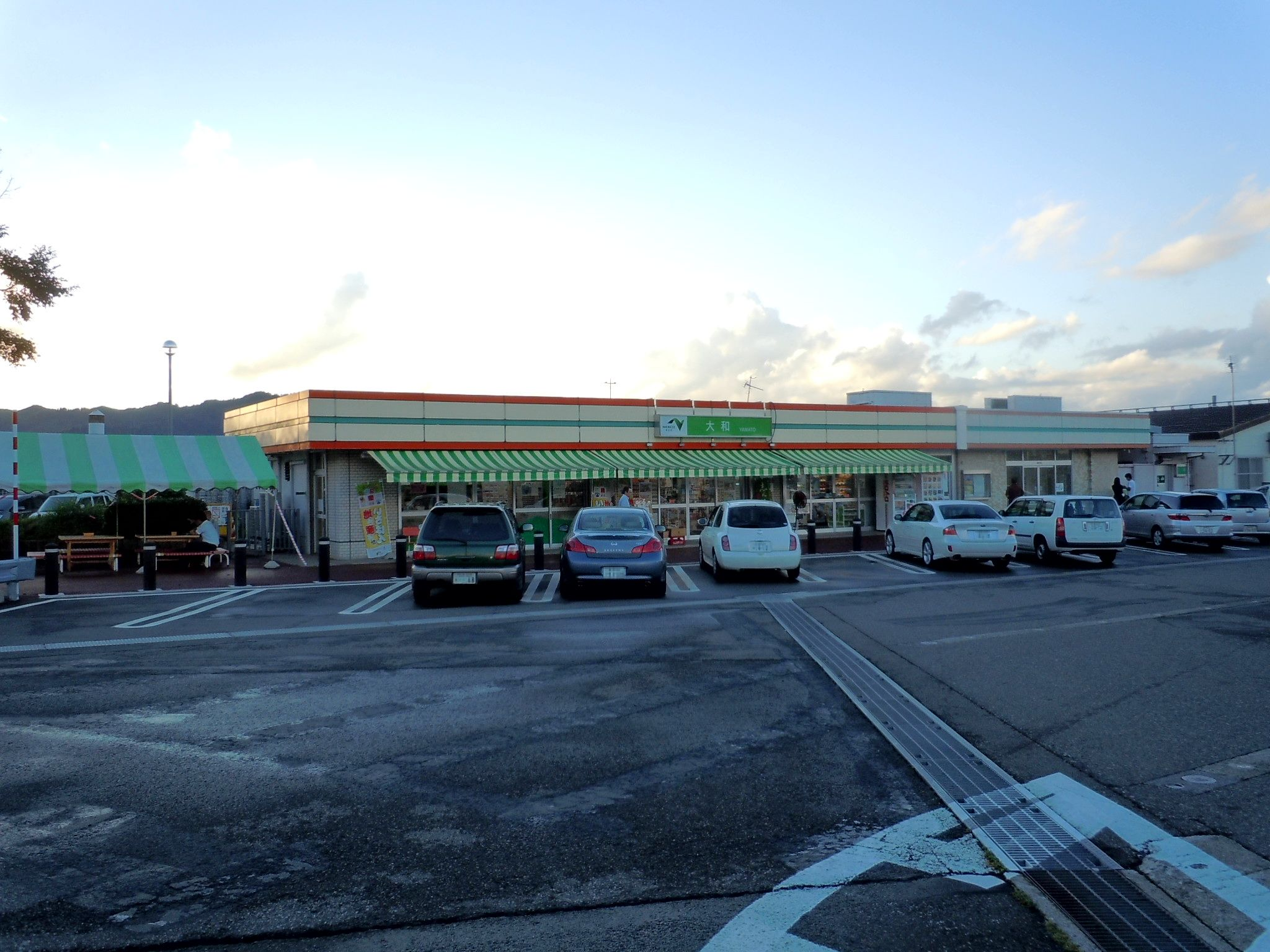 関越自動車道 大和パーキングエリア（下り線）